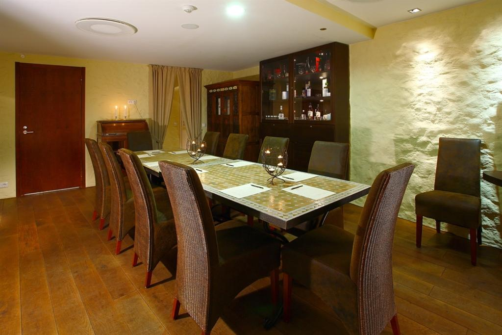 Savoy Boutique private seminar room